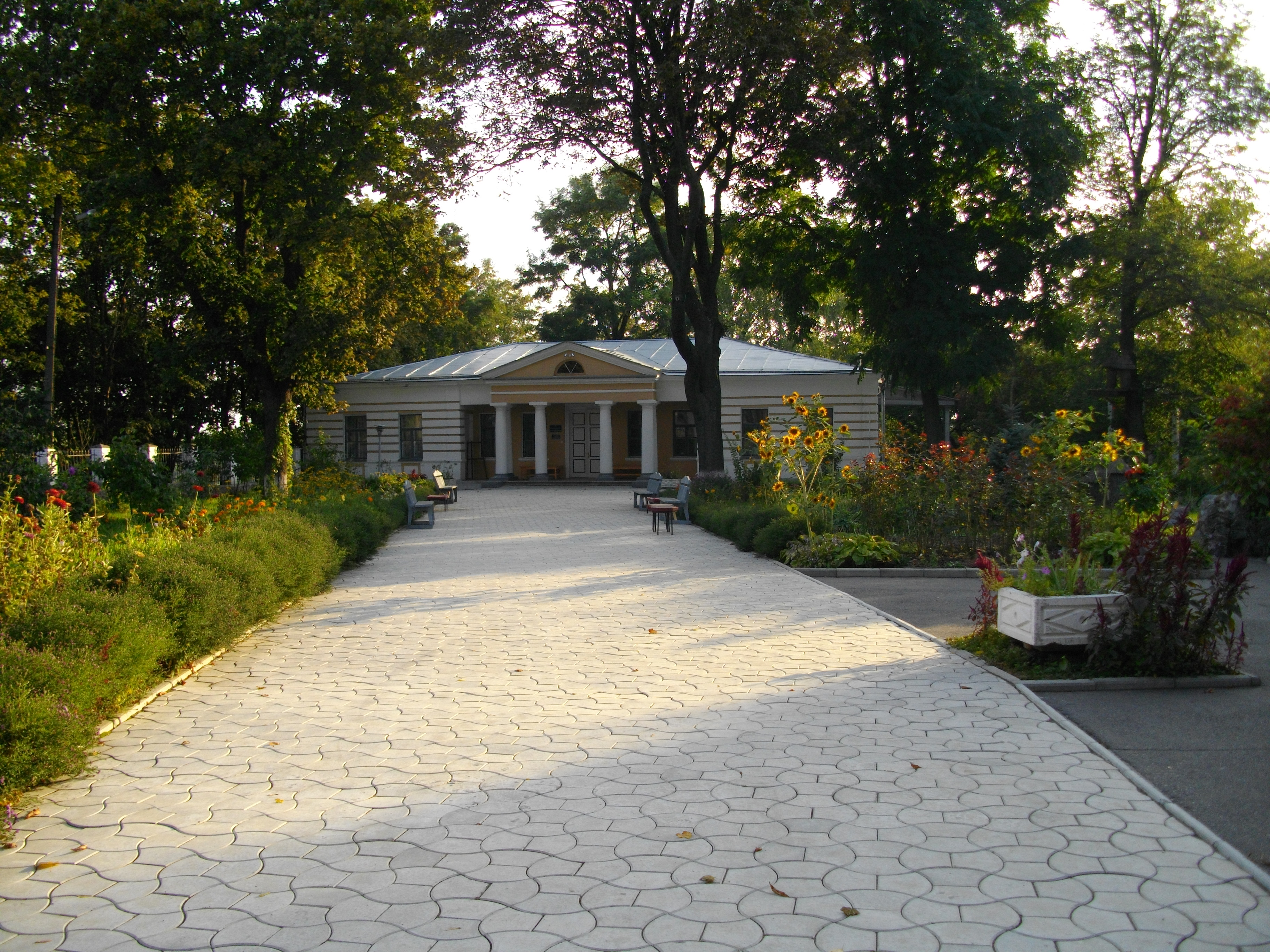 Садиба письменника В. Г. Короленка, Полтава, вул. Короленка, 1